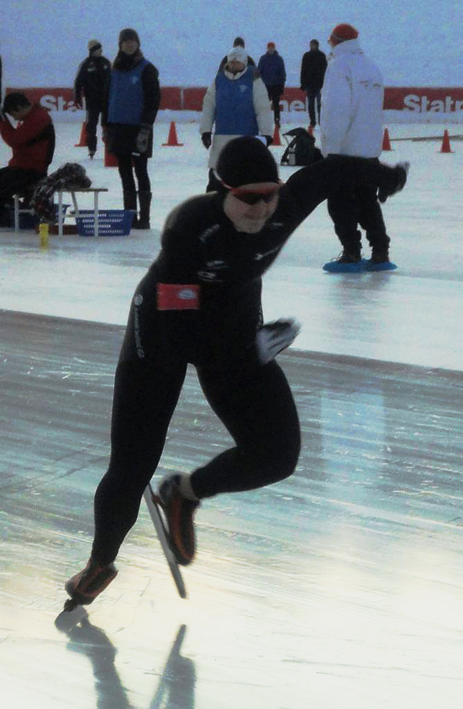 Hanne Haugland i startsteget for siste distanse (1000m) under Sprint-NM 2012 i Asker.